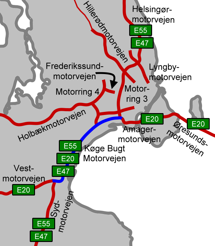 Map of Koge Bugt Motorvejen Copenhagen